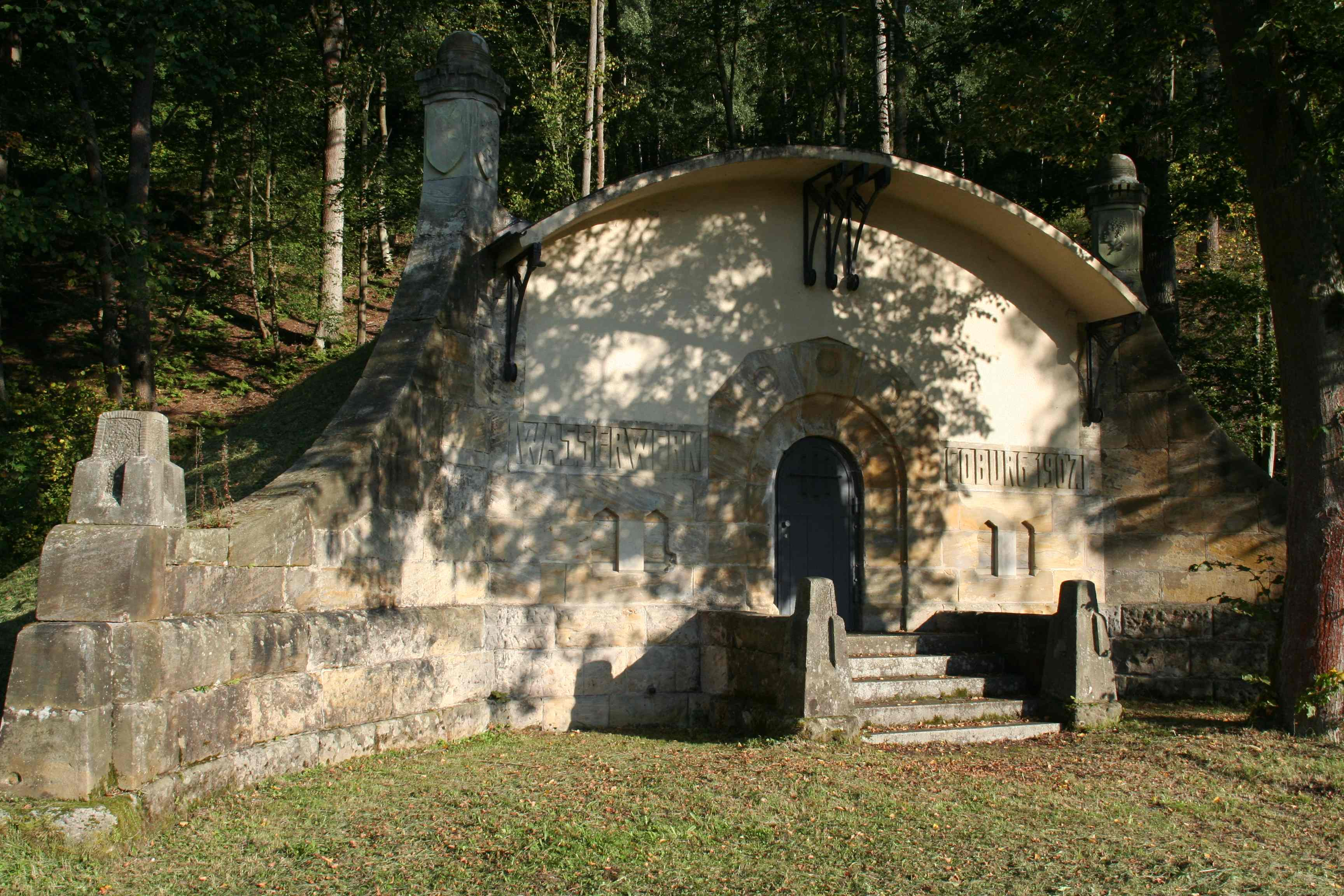 Brunnenhaus der Coburger Wasserversorgung bei (Rödental-) Fischbach (Froschgrund, Oberfranken)